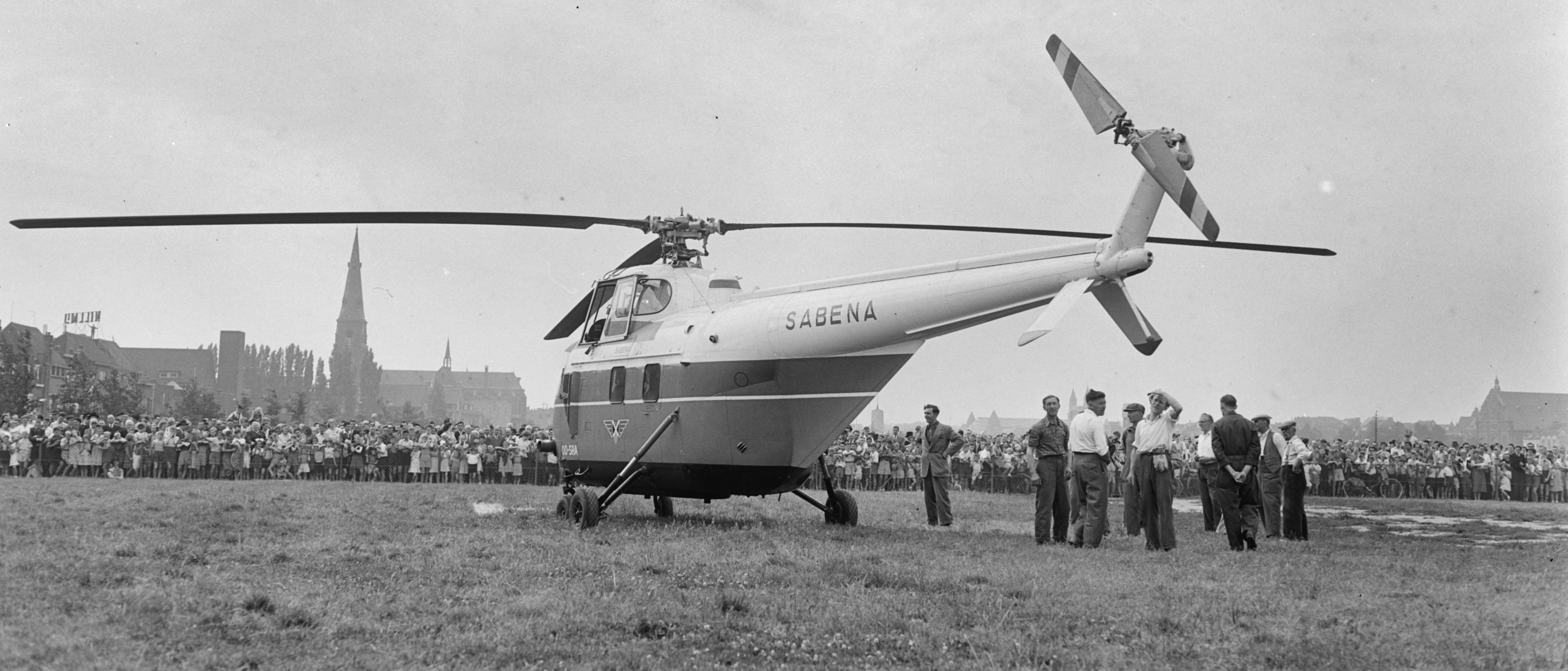 Collectie / Archief : Fotocollectie Anefo Reportage / Serie : Heliport van de Sabena op de Griend (in Maastricht) Beschrijving : helicopters Datum : 10 augustus 1953 Locatie : Maastricht Trefwoorden : helicopters, luchtvaart, postwezen Instellingsnaam : Sabena Fotograaf : Duinen, […] van / Anefo Auteursrechthebbende : Nationaal Archief Materiaalsoort : Negatief (zwart/wit) Nummer archiefinventaris : bekijk toegang 2.24.01.04 Bestanddeelnummer : 905-8741